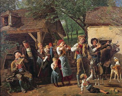 Die Pfändung